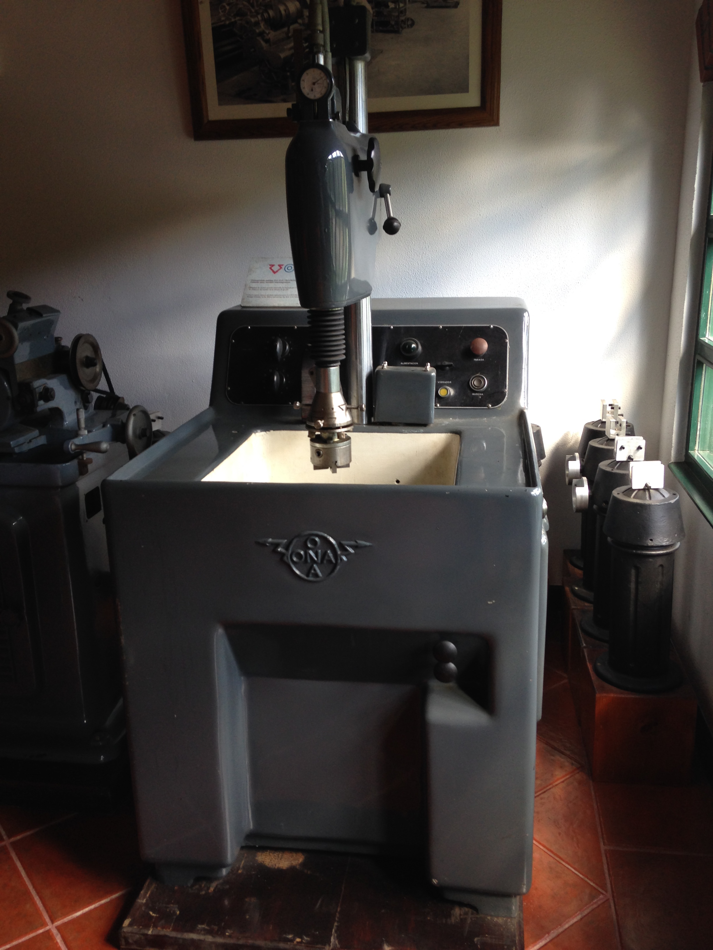 Museo de la maquina herramienta de Elgoibar (Gipuzkoa) País Vasco (España)